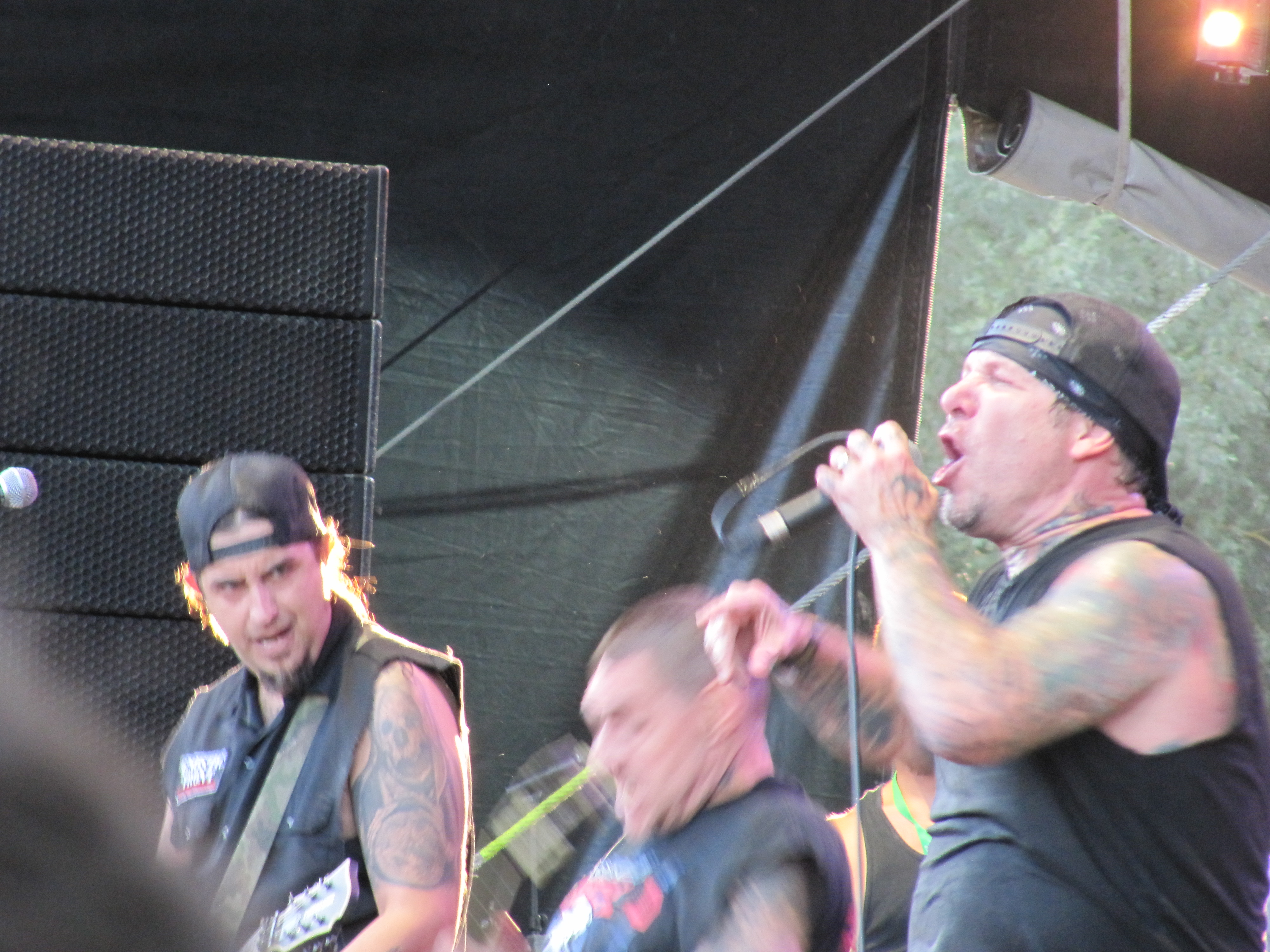 Groupe Agnostic Front au festival Cabaret Vert, en Ardennes, France